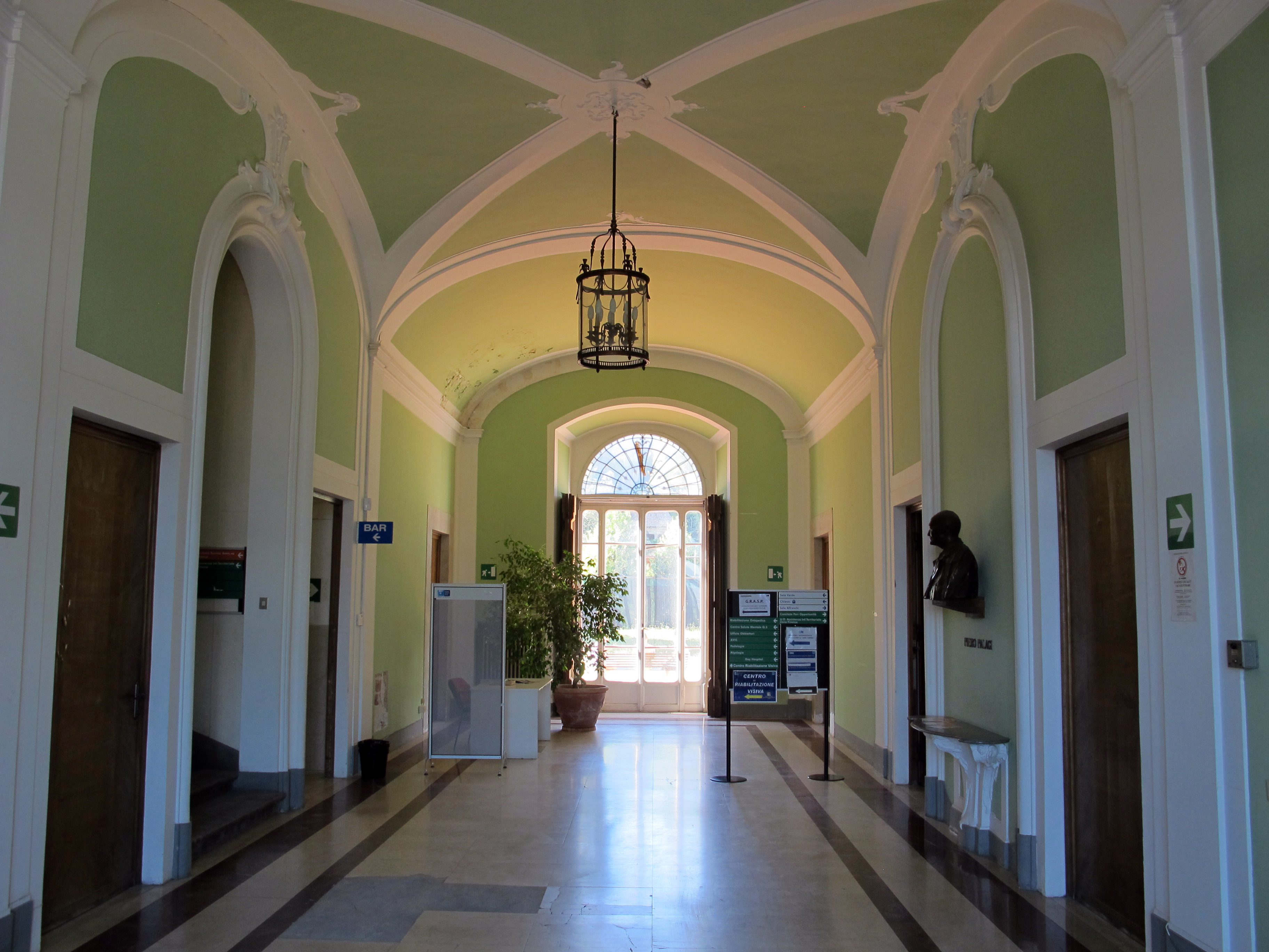 Ospedale Pietro Palagi, Florence